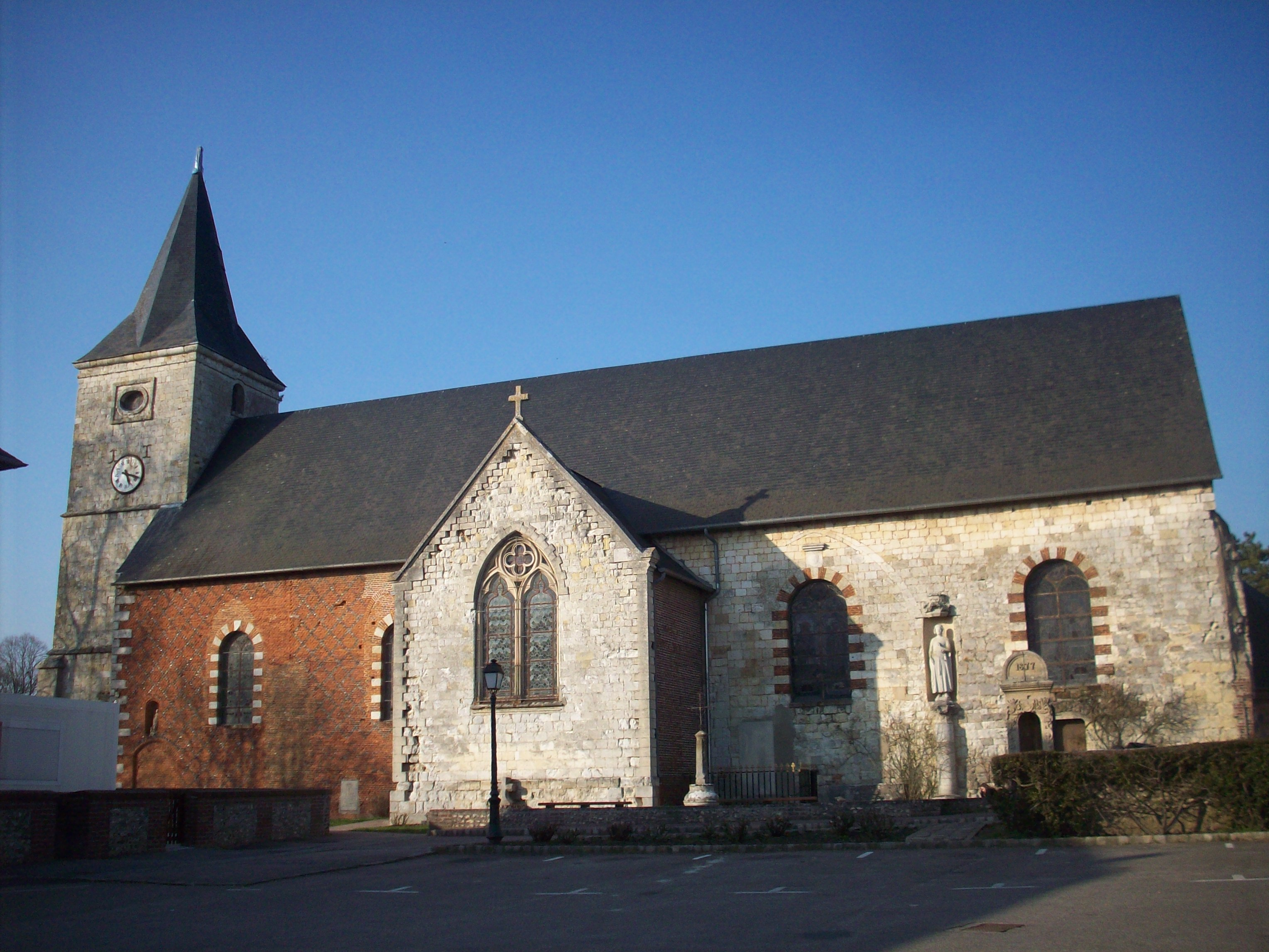 Vue de l'église Saint-Victor depuis le sud.